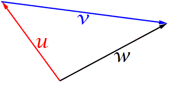 Pintura para visualizar espacios vectoriales